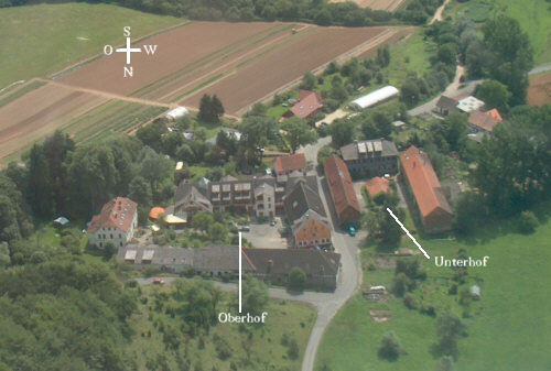 Luftbild von Hübenthal/Witzenhausen (Germany)